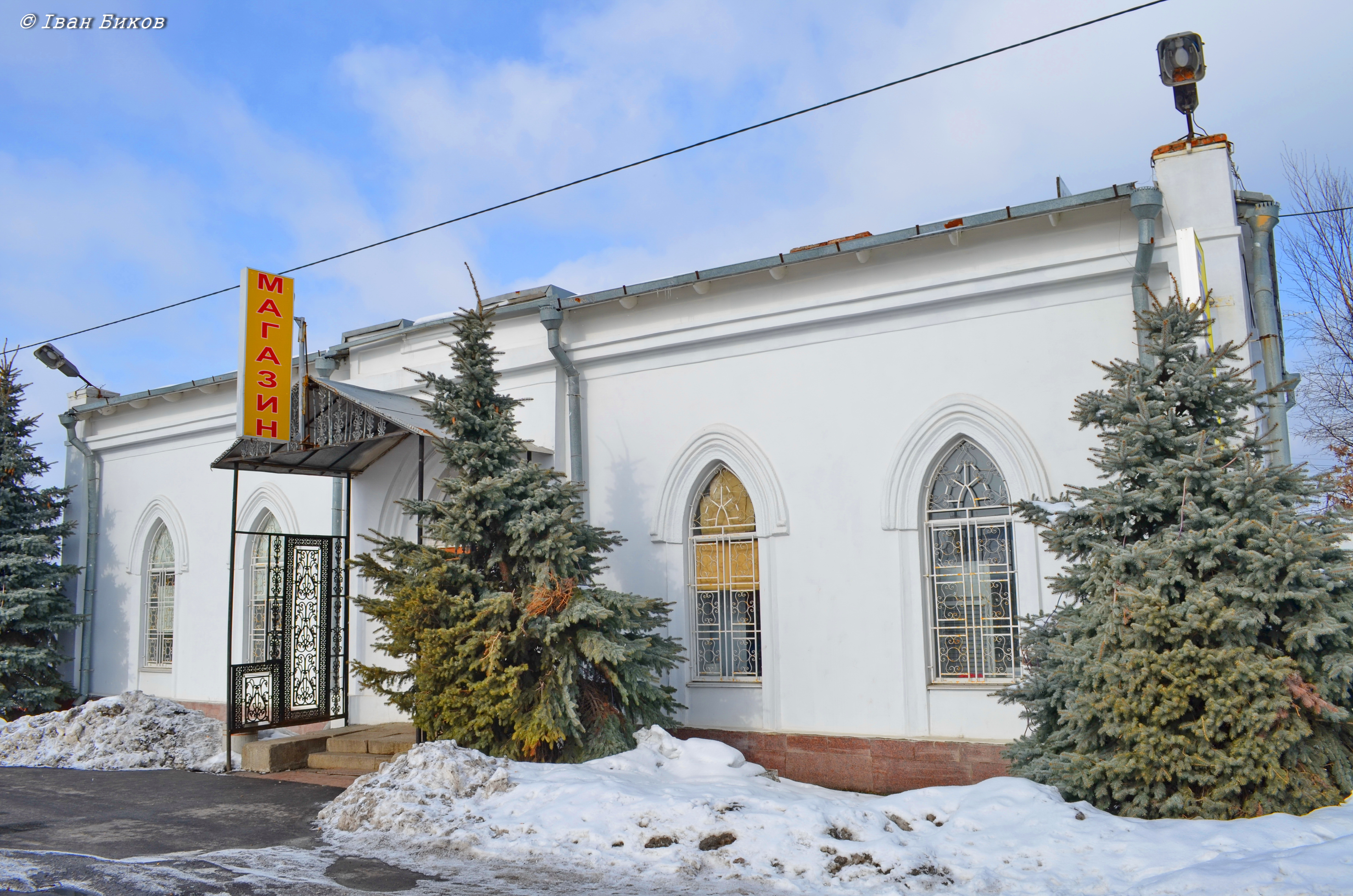 Поштова станція на 32 кілометрі (мур.), село Гурівщина, шосе Київ — Житомир, 32-й км